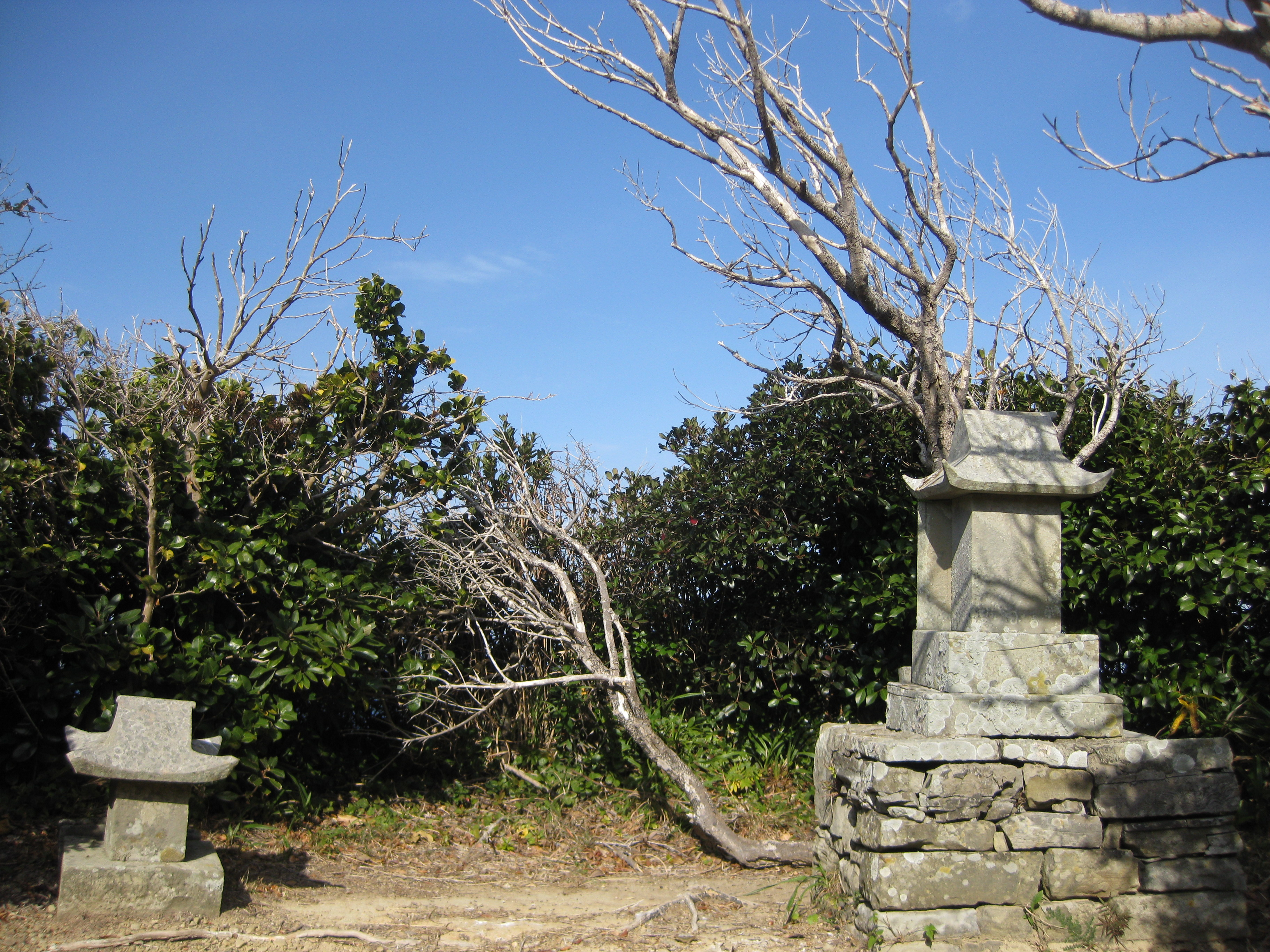 新上五島町 孕神社